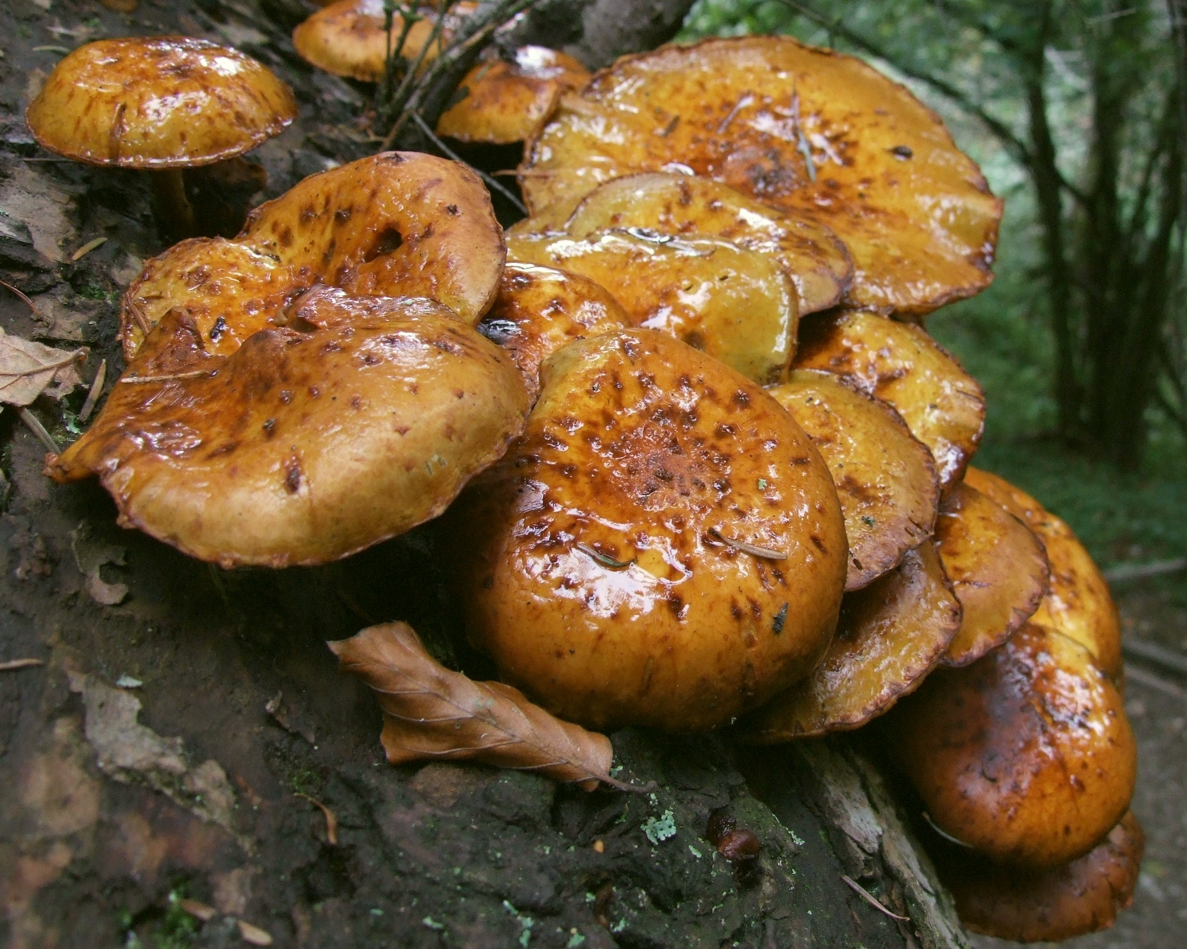 Pholiota adiposa (habitat:Pieniny)